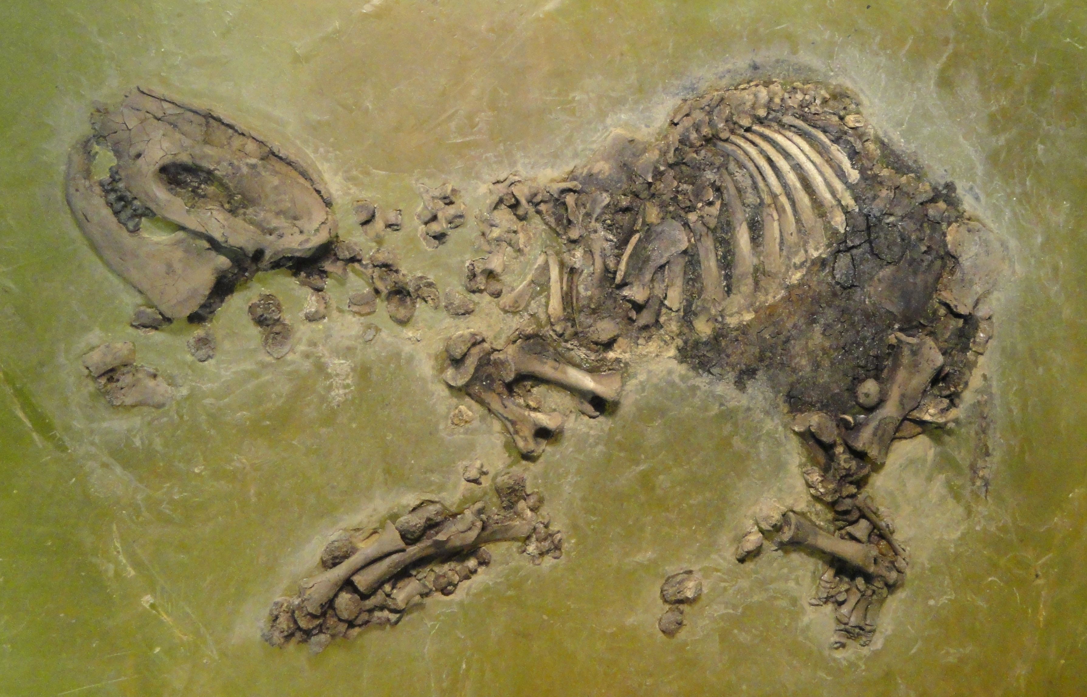 Exhibit in Naturmuseum Senckenberg, Frankfurt am Main, Germany.